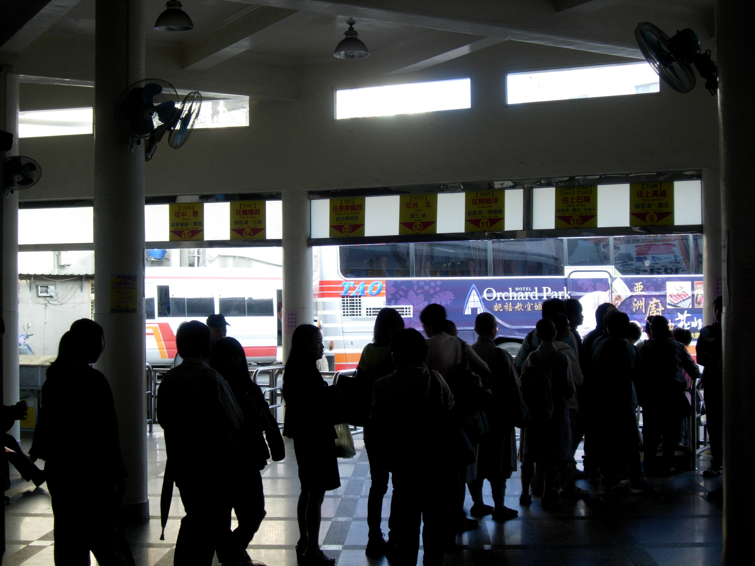 中文（台灣）: 桃園客運大溪站月台2